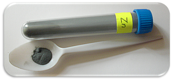 Práškový zinek